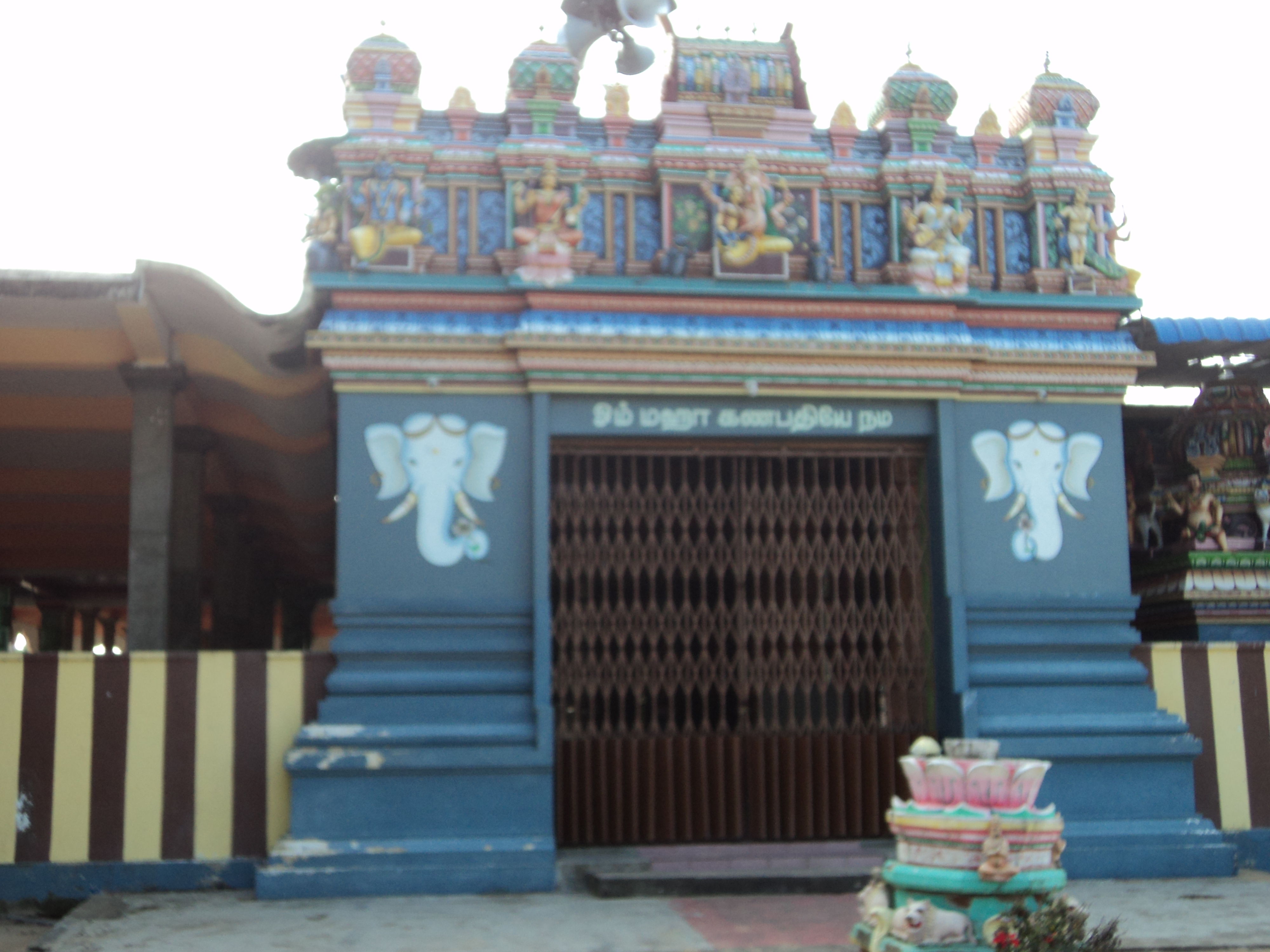 வீரமுனை சிந்தாயாத்திரைப் பிள்ளையார் கோவில் முகப்பு